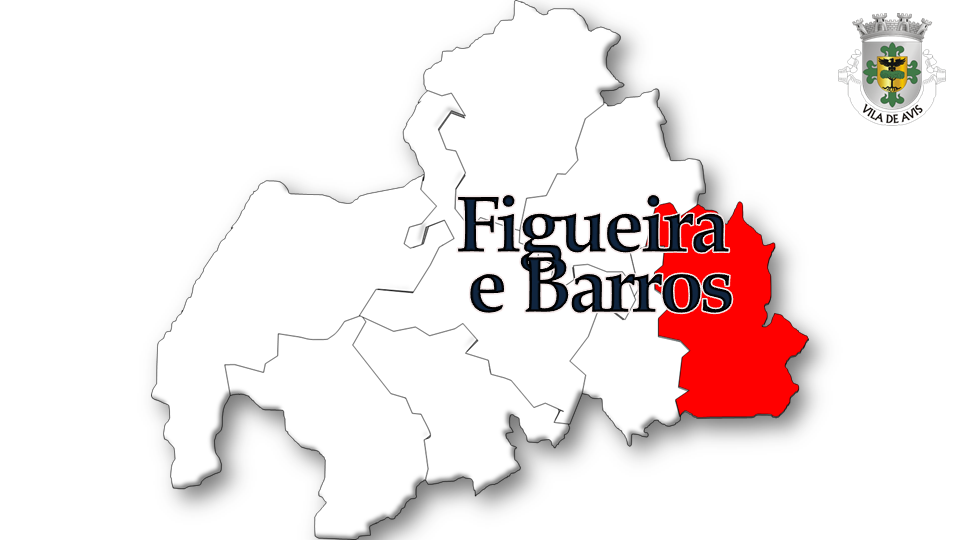 Evolução da População